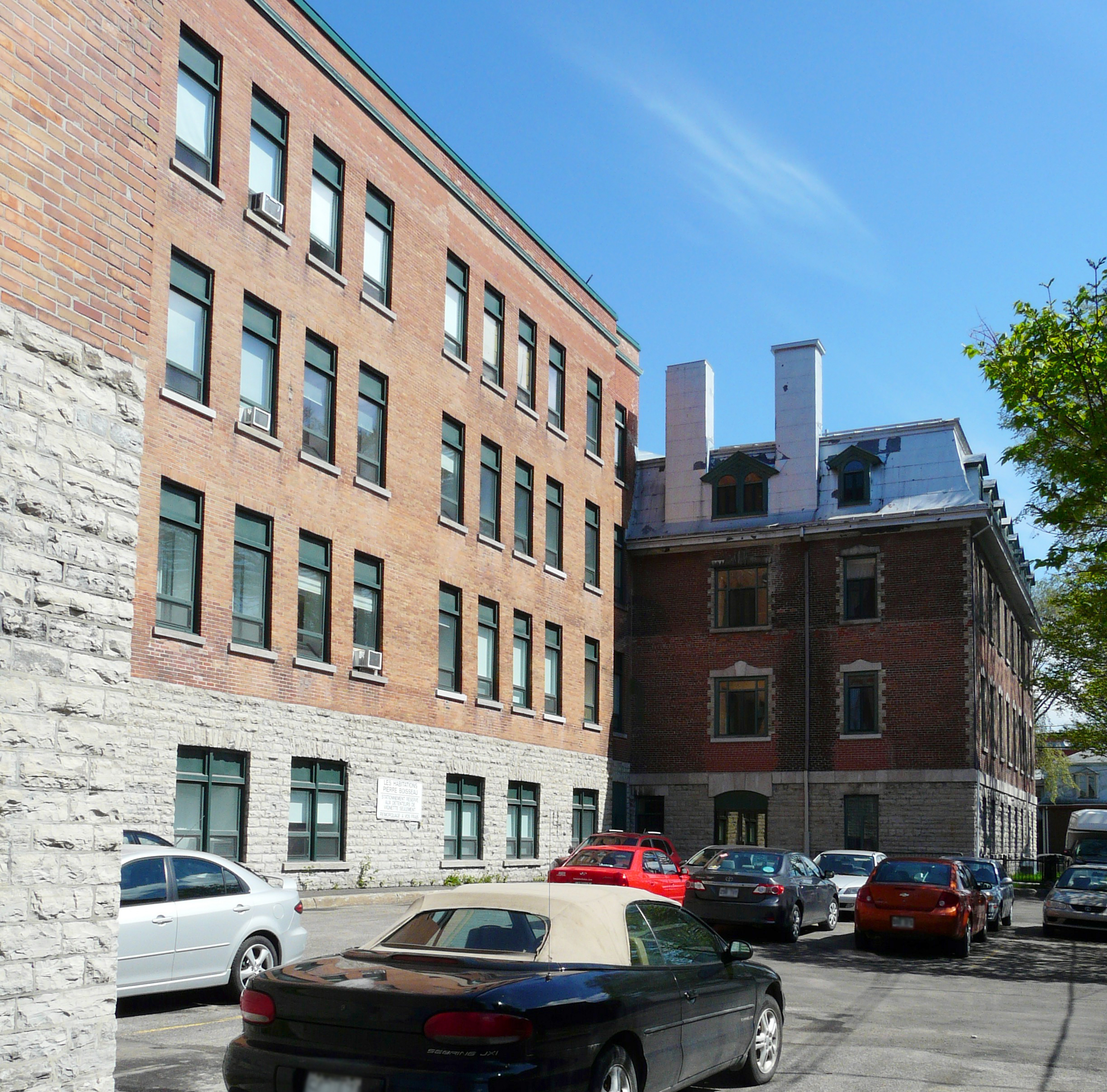 455 avenue des Oblats, Québec.